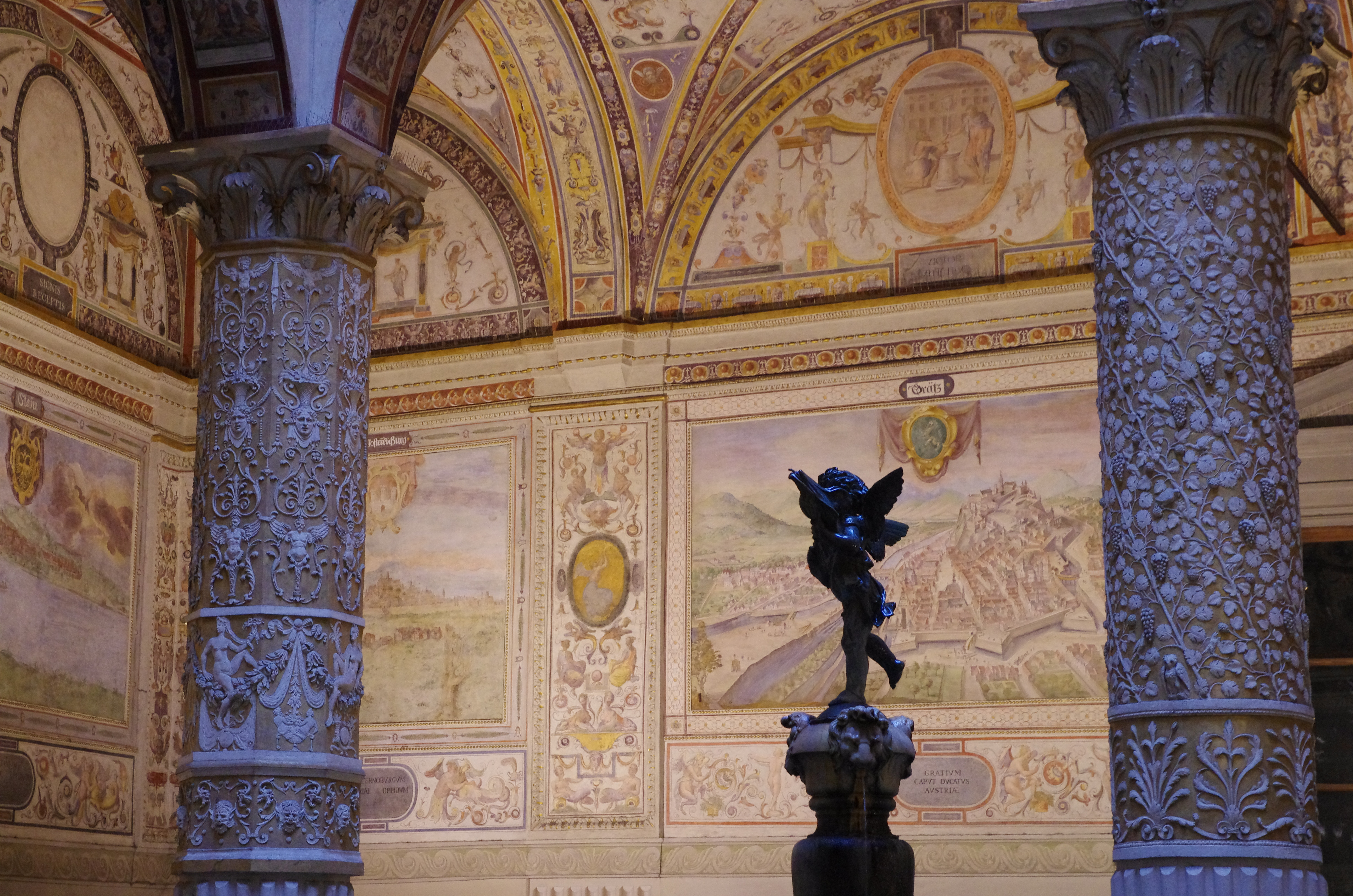 03 2015 Palazzo Vecchio (Firenze)-Cortile-Ordine Corinzio-Michelozzo di Bartolomeo Michelozzi-Putto con Delfino-Andrea del Verrocchio-Gratz-Grottesche-Giorgio Vasari Photo Paolo Villa FOTO9206